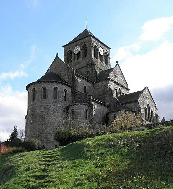 Chevet de l'église Saint-Aubin de Saint-Aubin-du-Cormier (35).